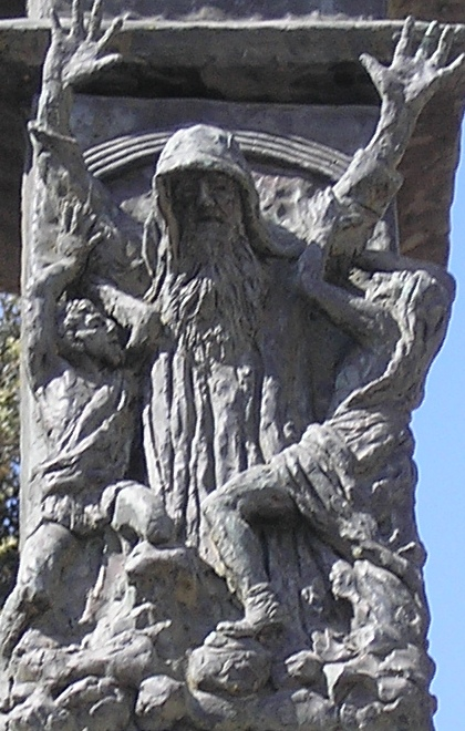 The Knesset Menorah, Jerusalem (detail - Moses)